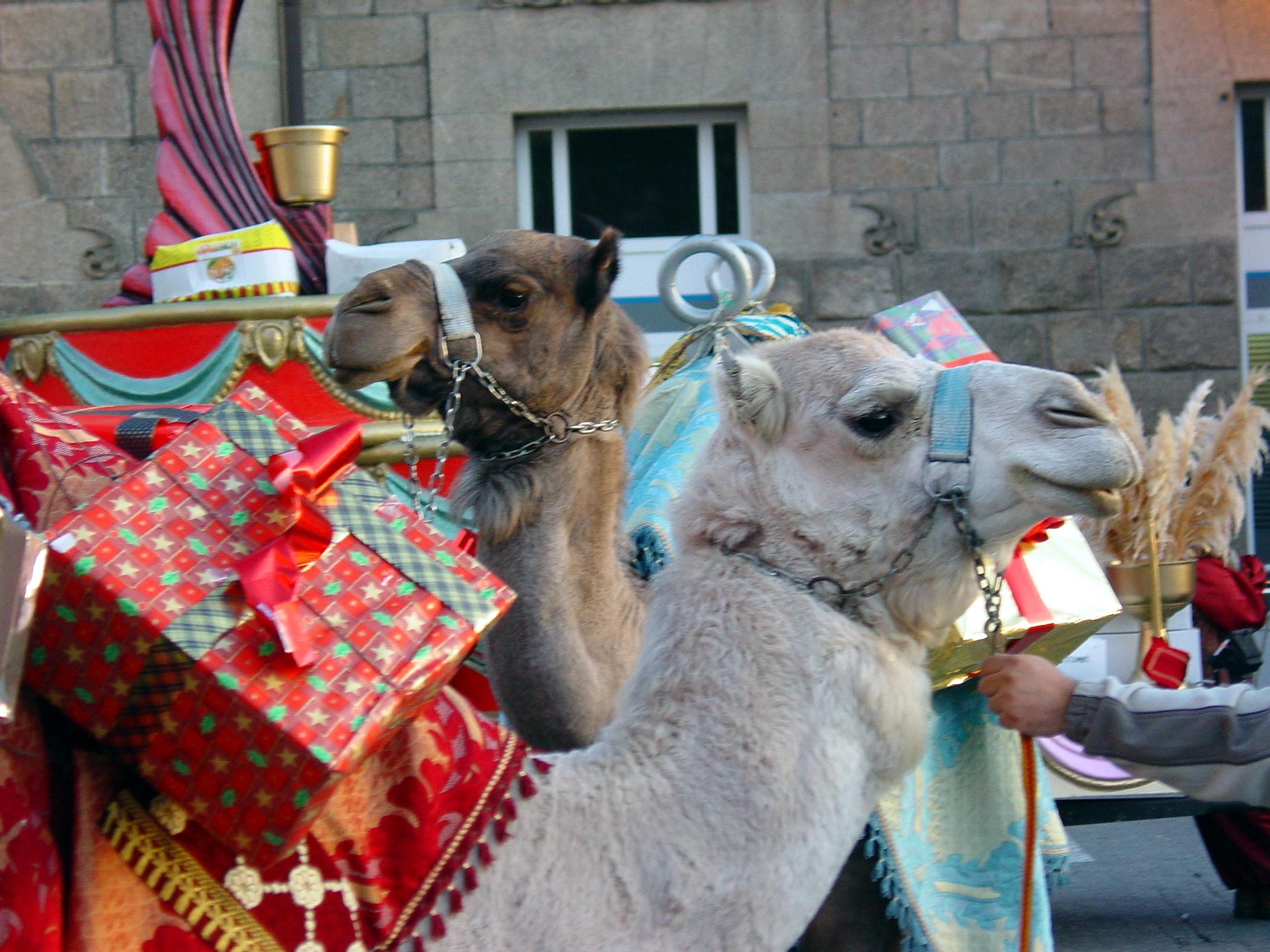 self made. Cabalgata dos reis magos en Santiago de Compostela - Galicia Dromedary_Camels